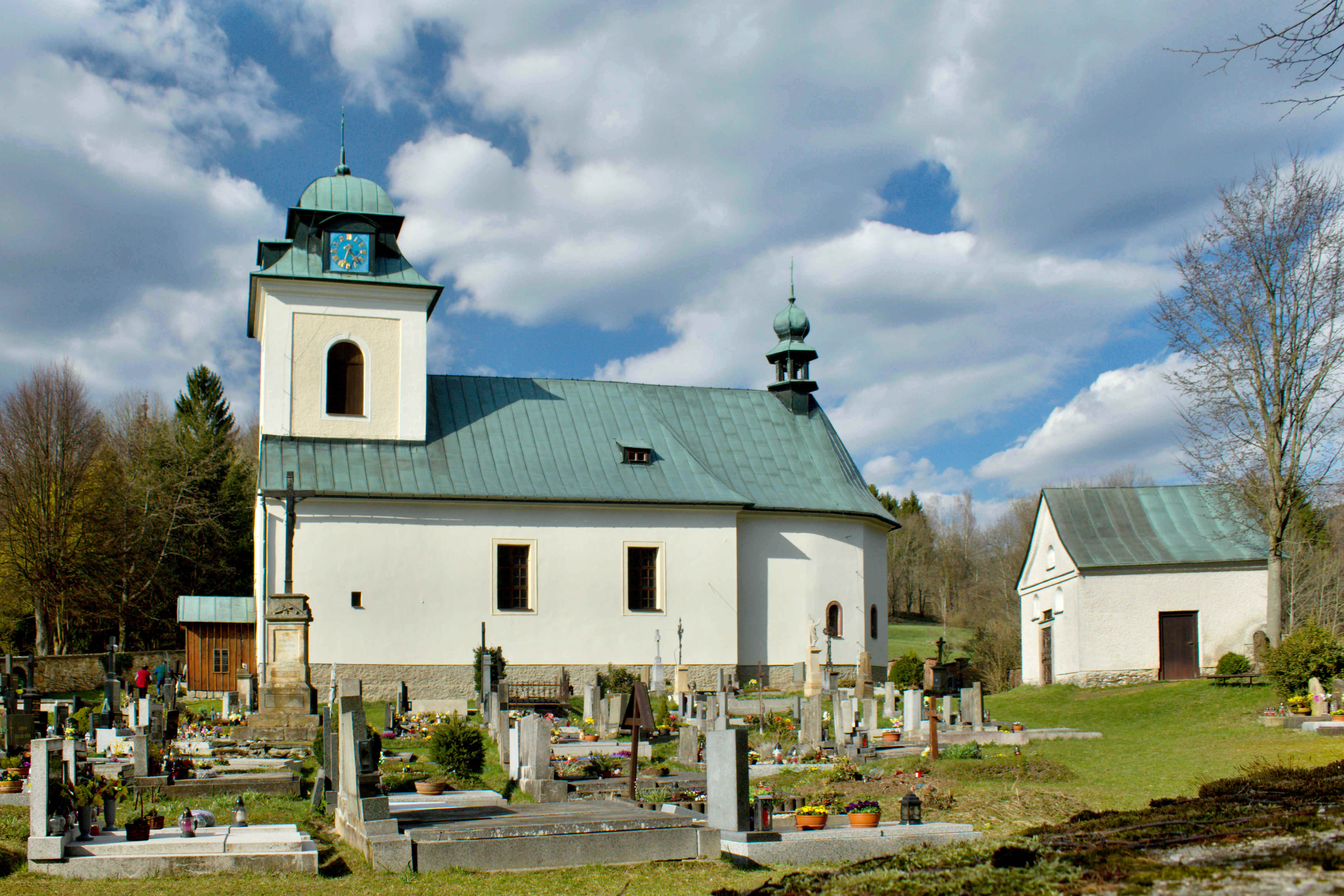 Benecko-Horní Štěpanice, kostel Nejsvětější Trojice